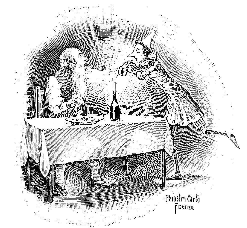 Illustrations from "Le avventure di Pinocchio, storia di un burattino", Carlo Collodi, Bemporad & figlio, Firenze 1902 (Drawings and engravings by Carlo Chiostri, and A. Bongini)